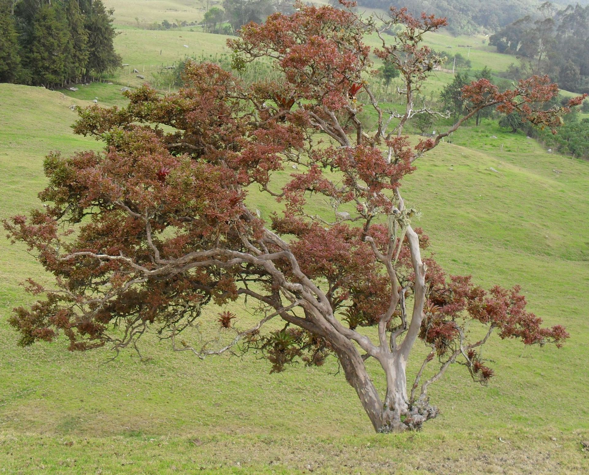 Árbol Myrcianthes leucoxyla en el área rural del municipio de Maripí Boyacá Colombia